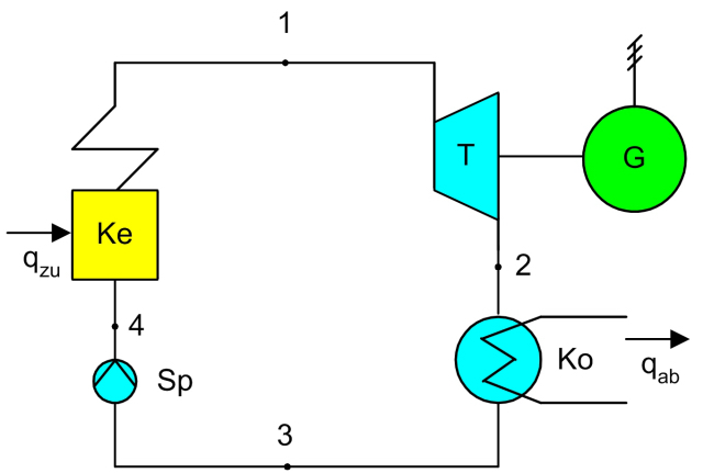 Clausius-Rankine-Prozess, Schaltbild